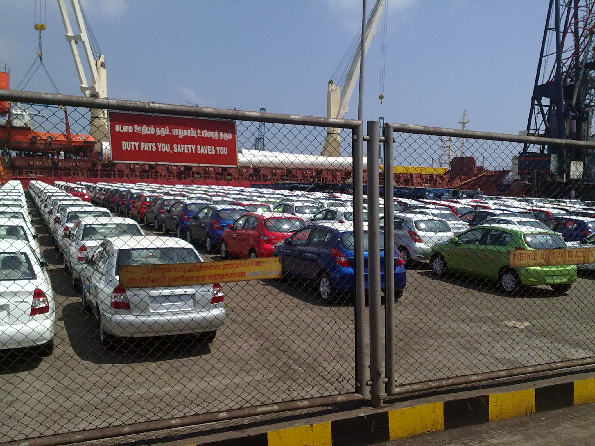 xe ben hyundai